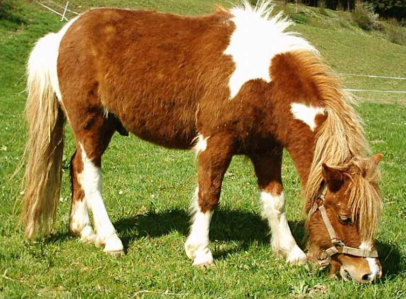 Ein Pony-Mischling namens Rusty im Aschthal bei Landsberg a. Lech, Public Domain, Fotograf: Thomas Springer, Entstanden: 2004